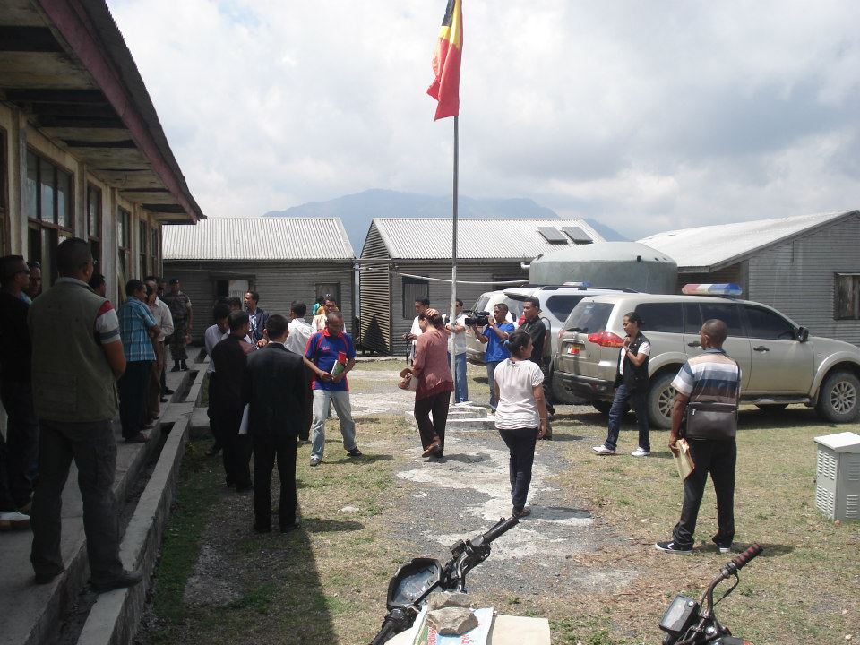 Posto da UPF, Alto Lebos, Município de Bobonaro